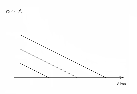 Költségvetési halmaz és korlát, illusztráció a Közömbösségi görbe cikkhez